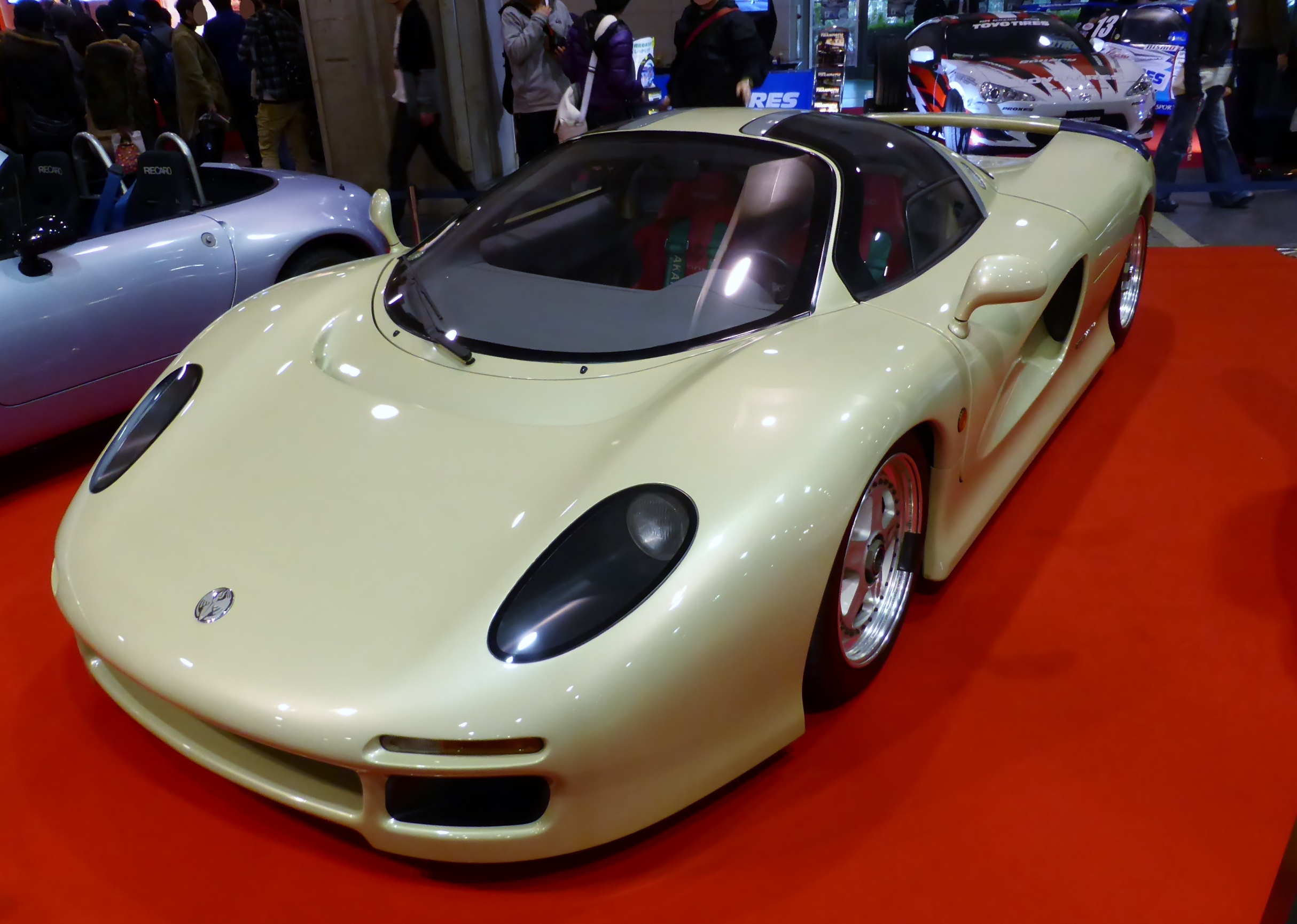 大阪オートメッセ2014においてジオット・キャスピタを撮影。